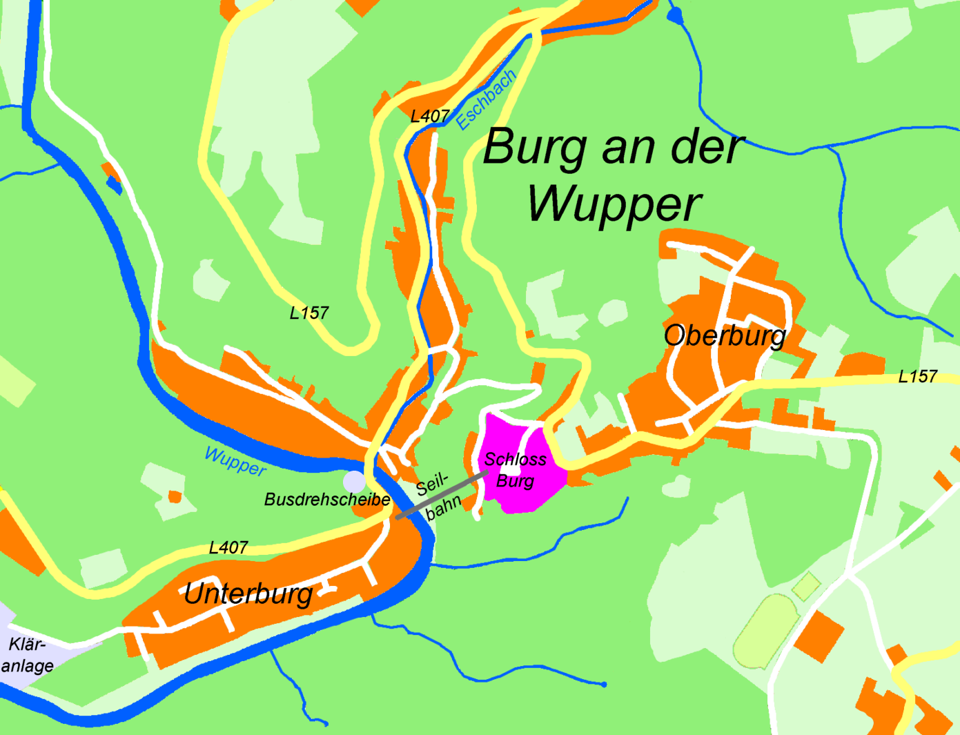 Karte von Burg an der Wupper (Solingen, NRW, Deutschland) 2005 selbst erstellt